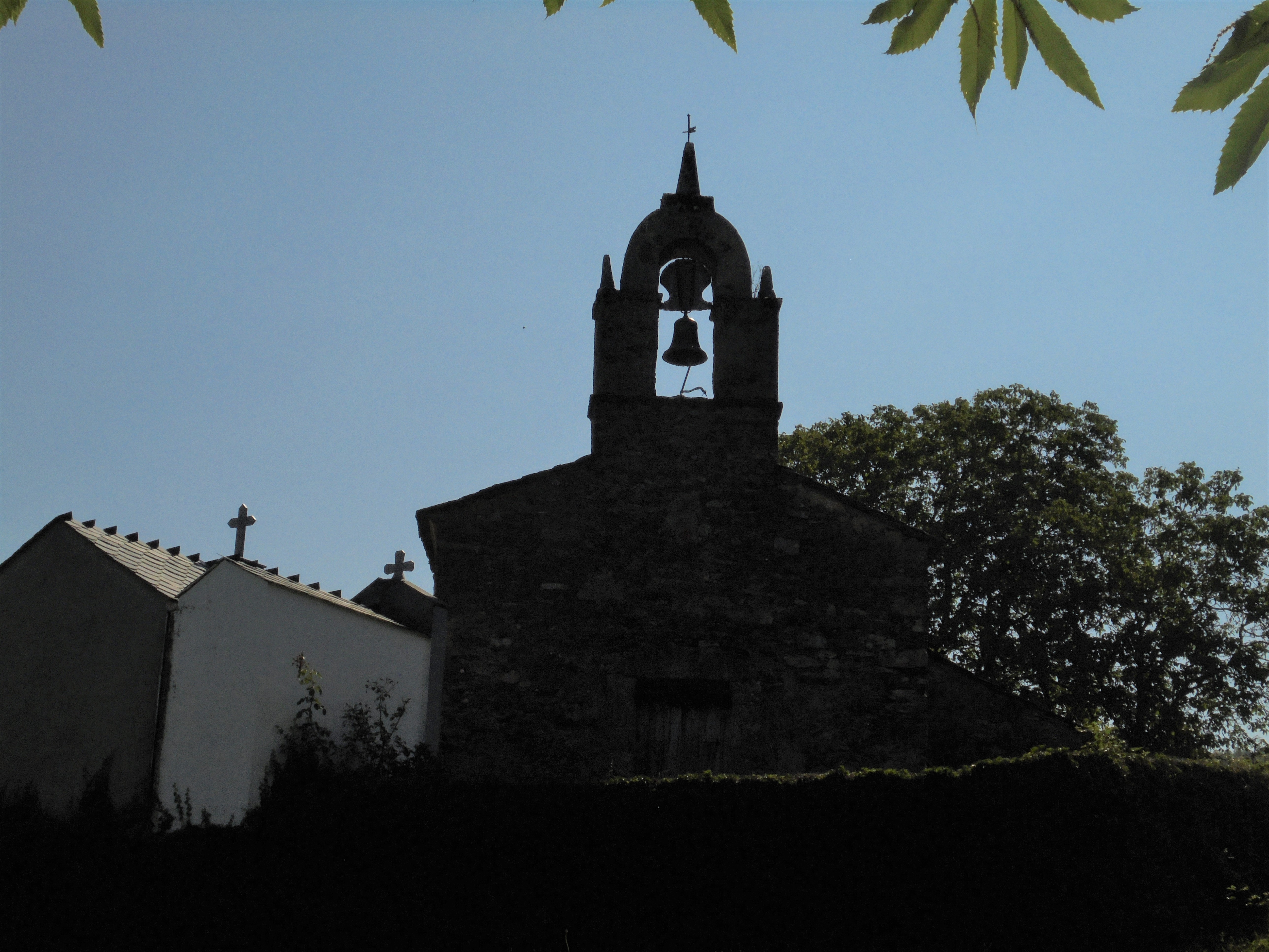 Igrexa de Santa Marta de Vilarpunteiro